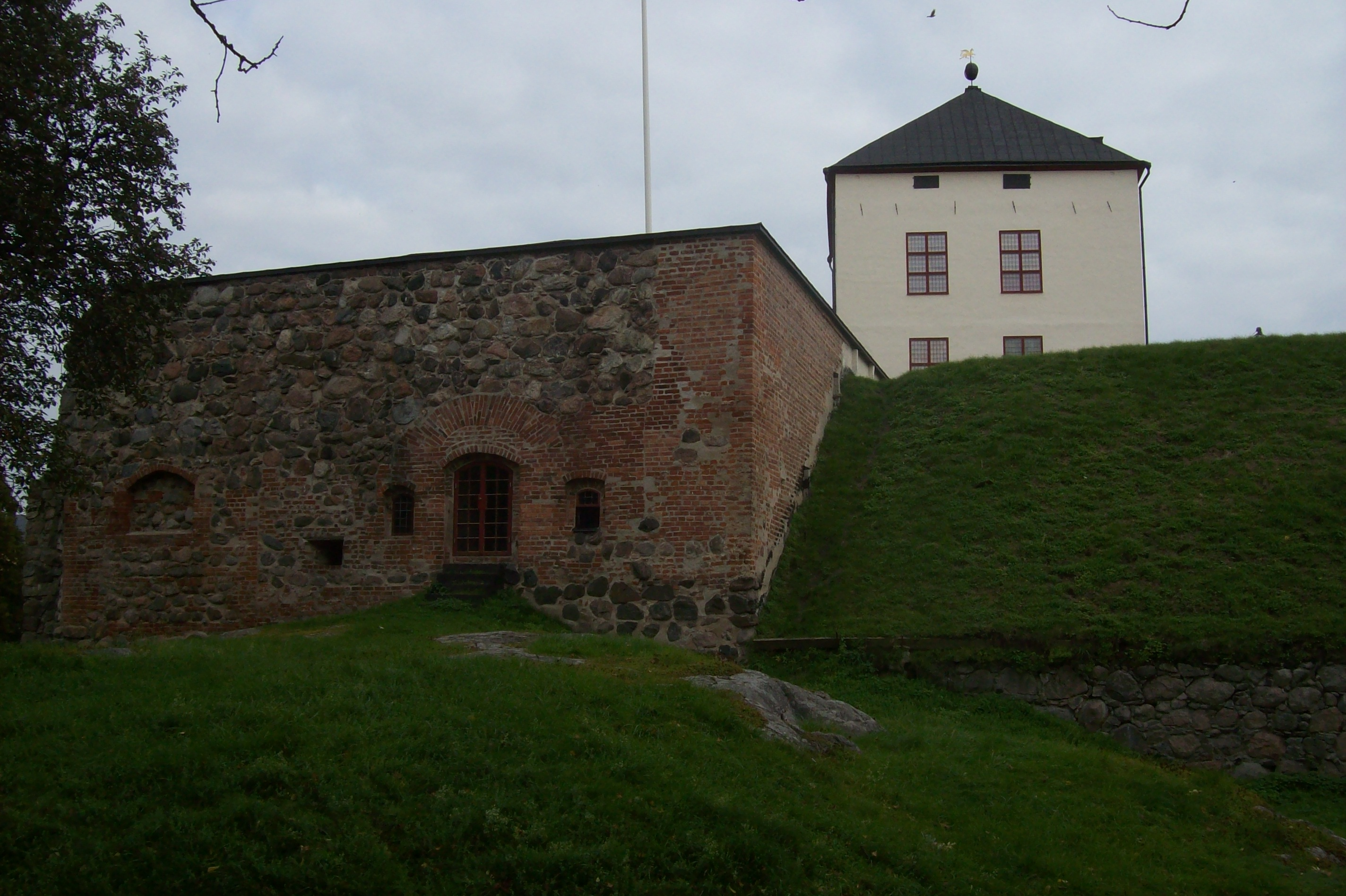 Nyköping, Nykopings Hus 1, hus nr 1